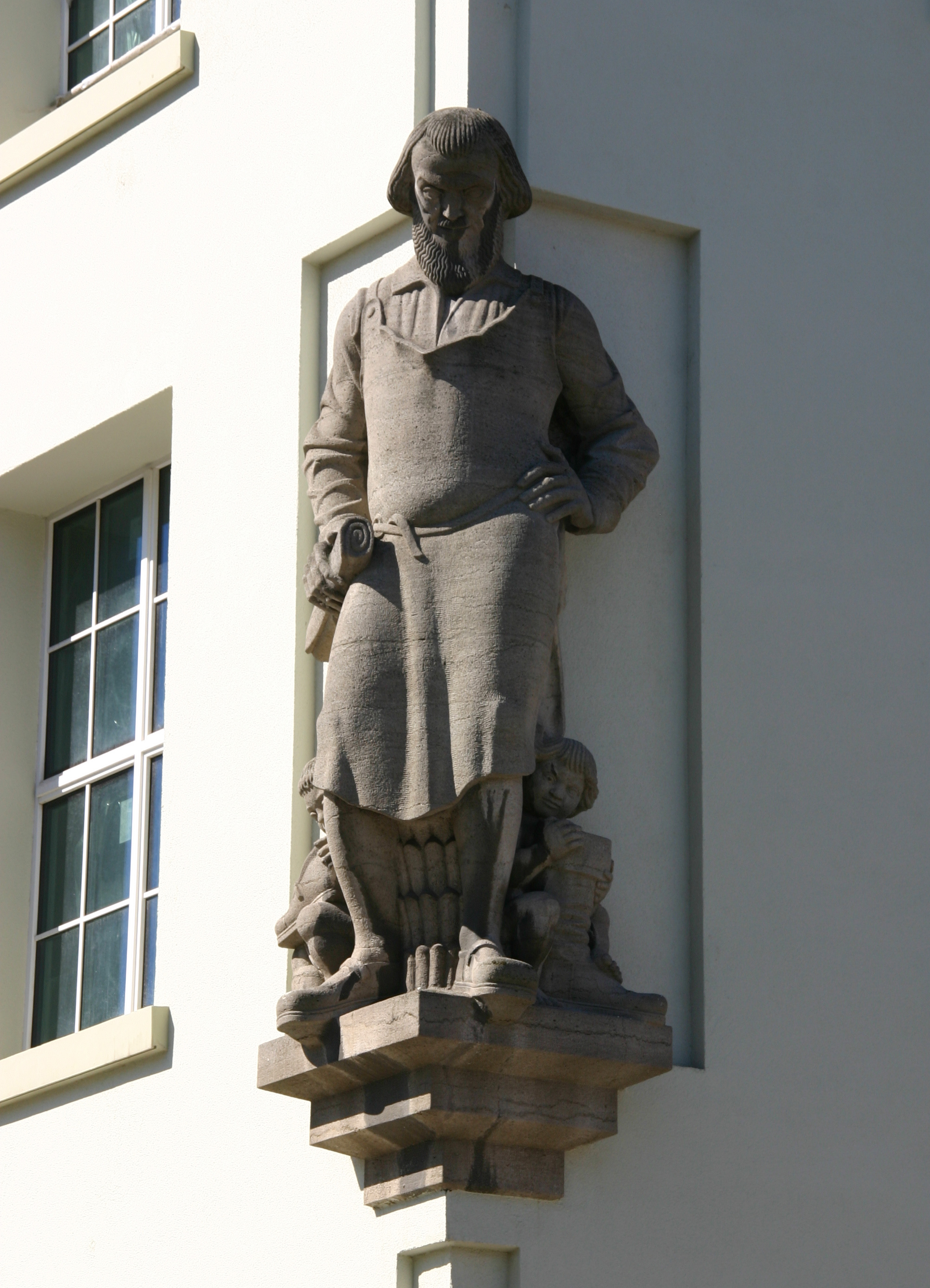 Pirmasens, ehemalige Schuhfabrik Rheinberger; weitläufiger Komplex um mehrere Höfe, westliche Hälfte 1905/06; Verwaltungsbau (?) mit zwei zusätzlichen, gestuft zurückspringenden Geschossen, Einfluss der Moderne und der Reformarchitektur mit klassizisierenden Elementen. Jetzt u.a experimentelles Museum "Dynamikum".